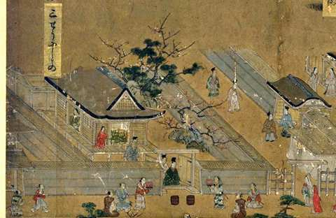 洛中洛外図屏風、狩野元信、1520年代